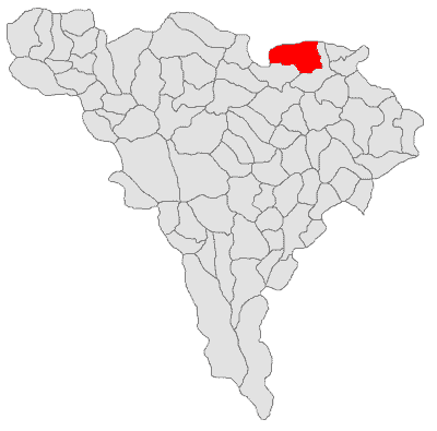 Categorie:Hărţi ale judeţului Alba